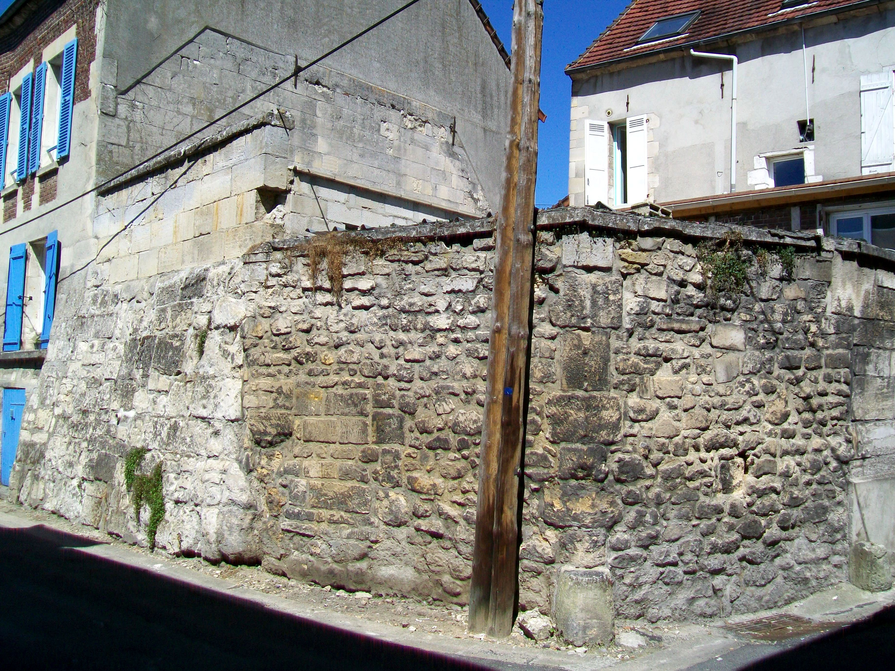 Vestiges des remparts, réparés pour la dernière fois en 1575 et démolis à la Révolution ; rue de l'Éperon, à l'extrémité sud-ouest de la vieille ville.